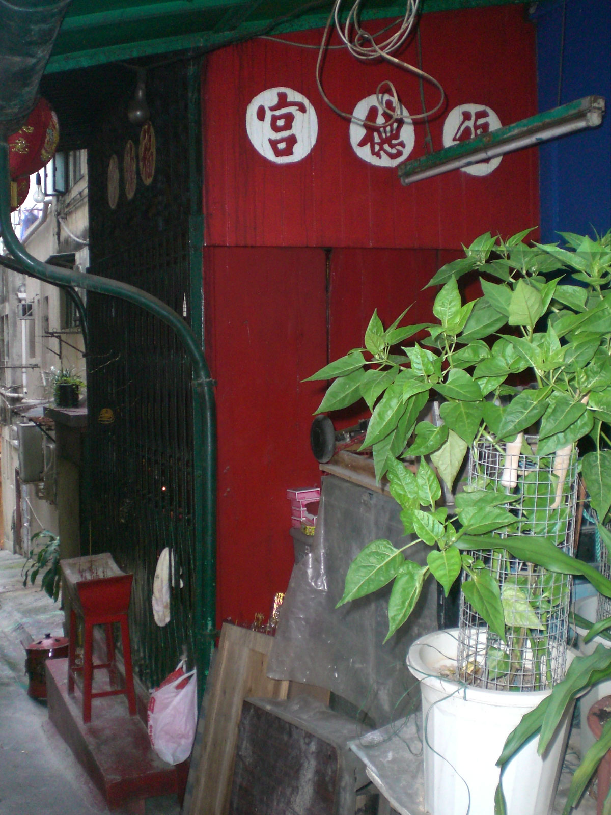 上環zh:西街zh:水巷zh:福德宮近太平山街